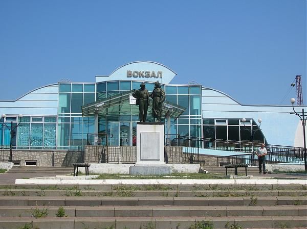 Залізничний вокзал